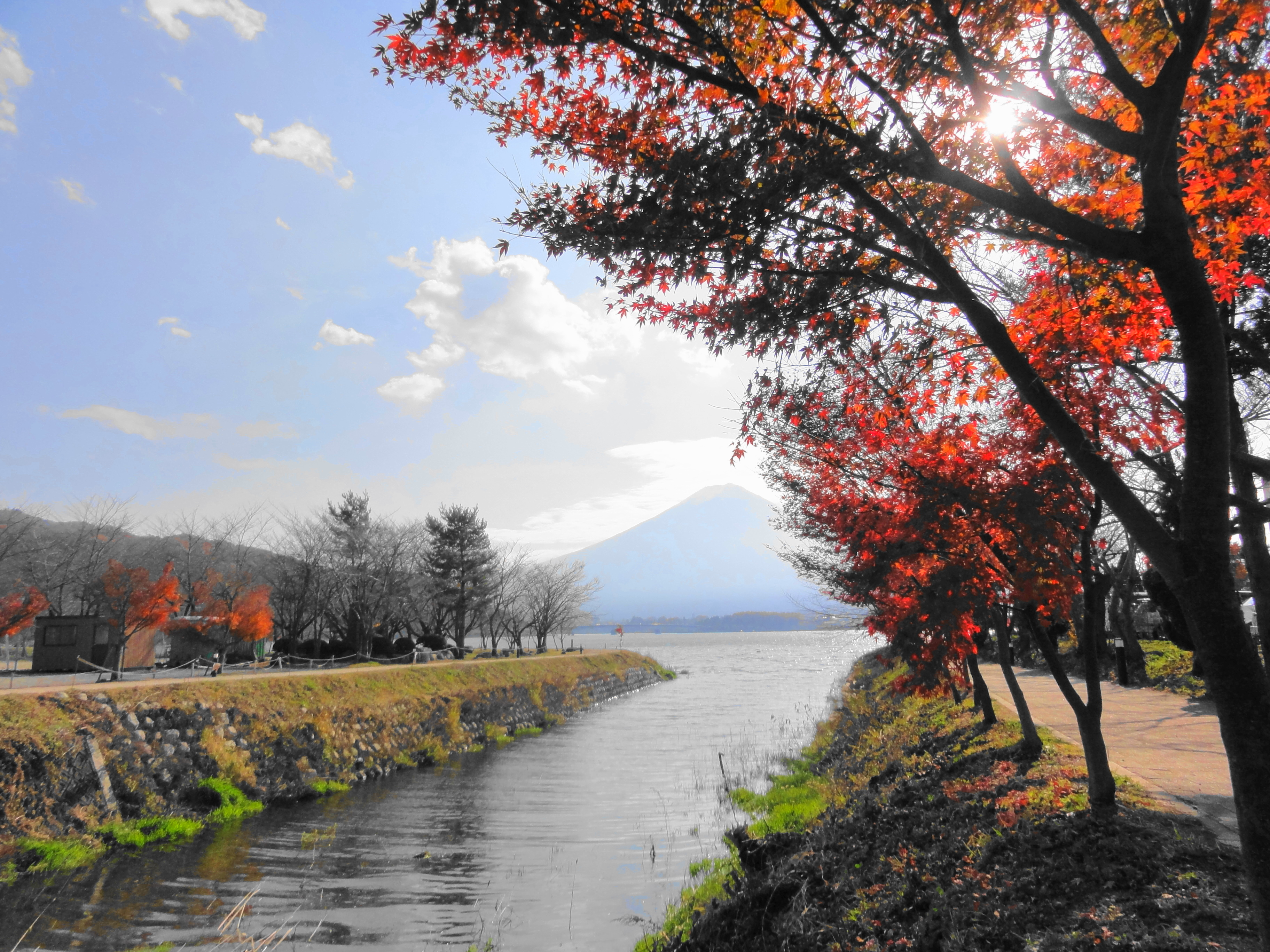 河口湖の紅葉、手前は相模川水系の西川